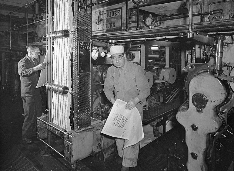 Svenska Dagbladets tryckeri vid Karduansmakargatan i Klarakvargteren